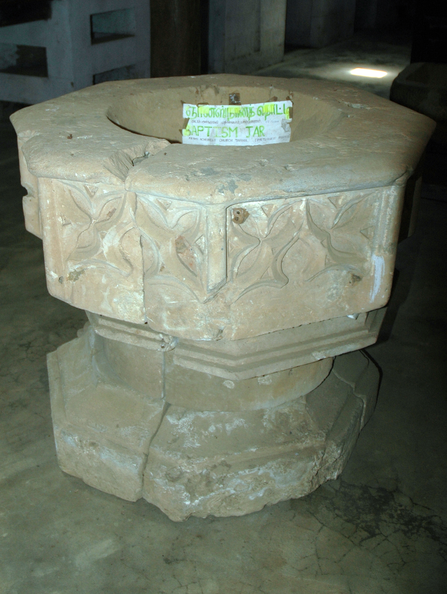 ஞானஸ்நானத் தொட்டி (போர்த்துக்கேயர் காலம்) - தொல் பொருட்காட்சிச்சாலை, யாழ்ப்பாணம்